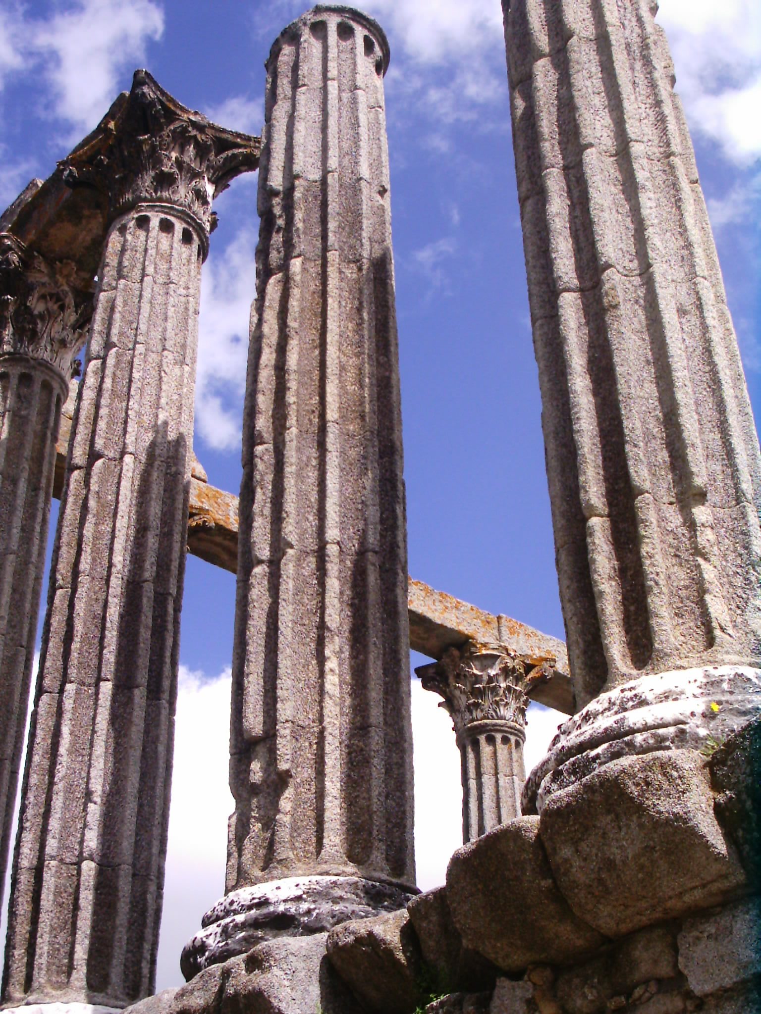 Vista do Templo romano de Évora, Évora, Portugal.